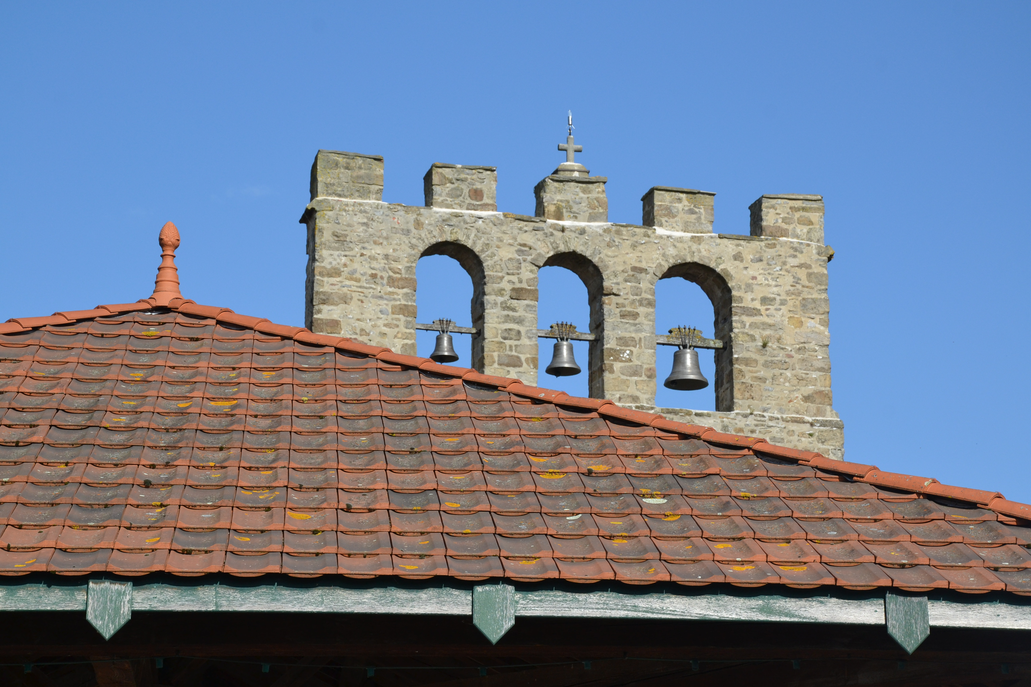 Église Saint-André du Peyrat (Ariège, France).